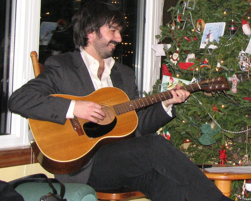 Damien Robitaille, musicien franco-ontarien faisant carrière principalement au Québec.